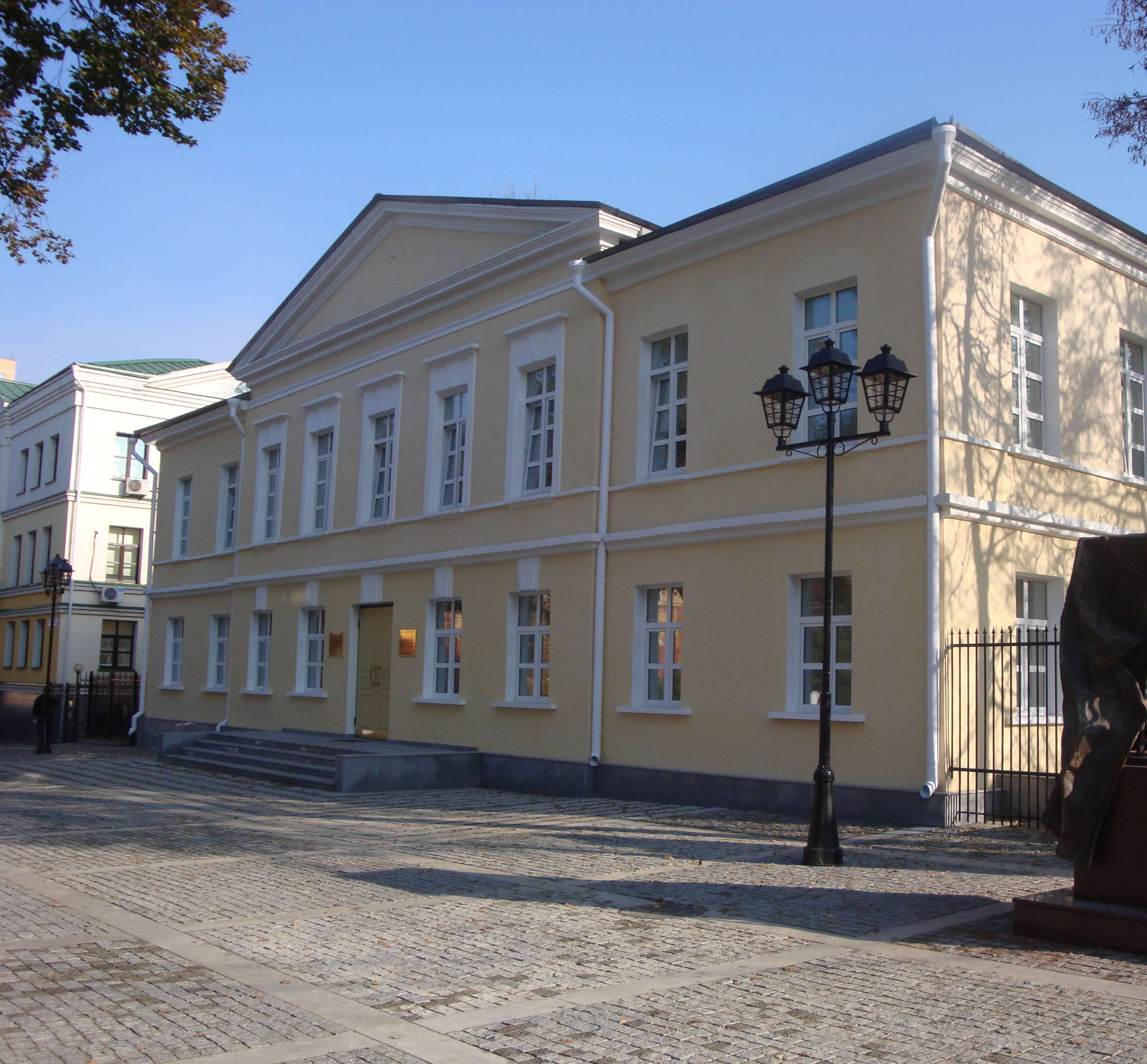 Краеведческий музей в историческом центре Подольска на Советской площади (открыт в отреставрированном здании Присутственных мест в 2011 году). Справа расположен памятник швейной машинке американской компании "Зингер".